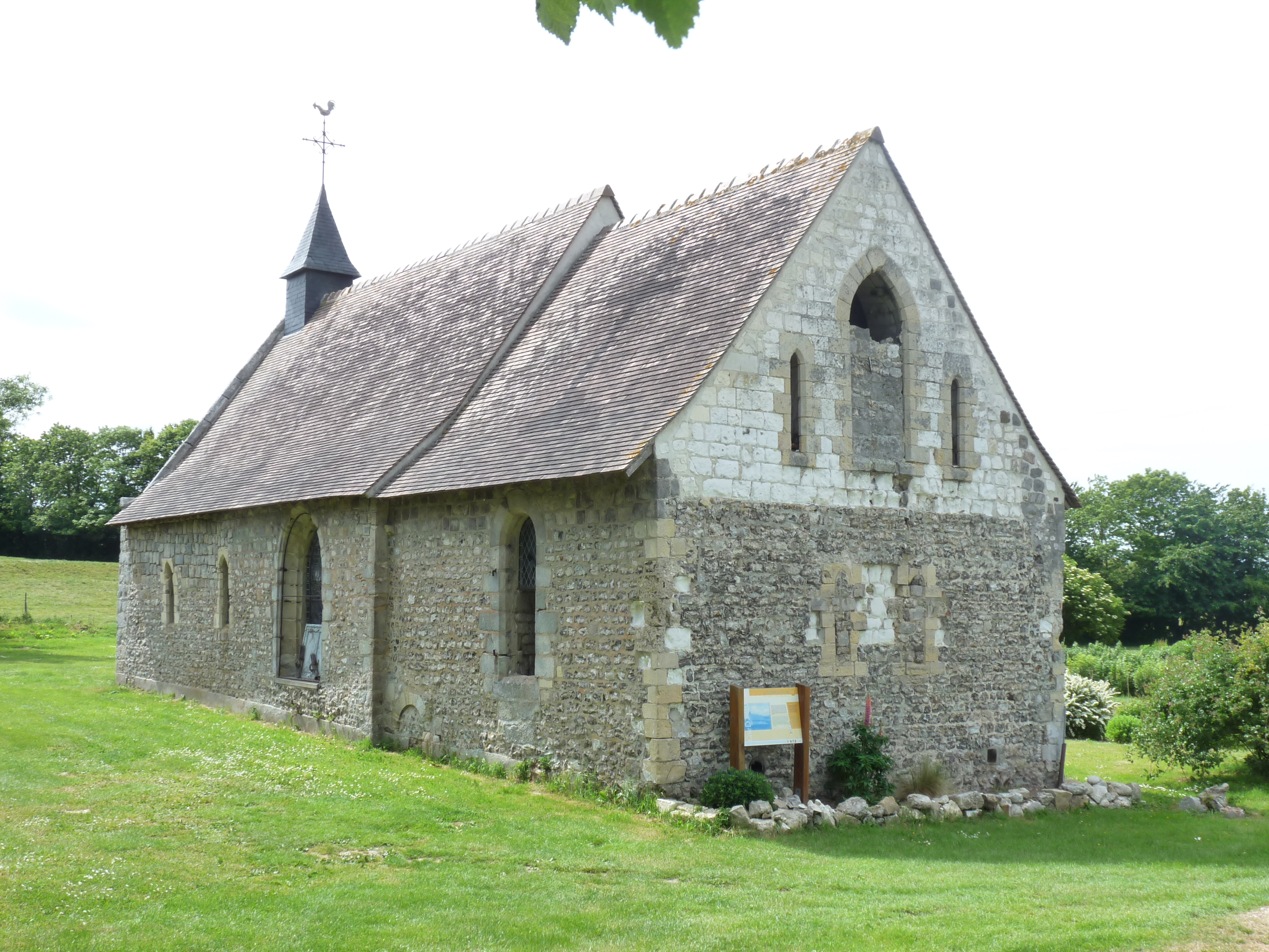 Chapelle Notre-Dame-du-Val de Sotteville-sur-Mer (Inscrit) .